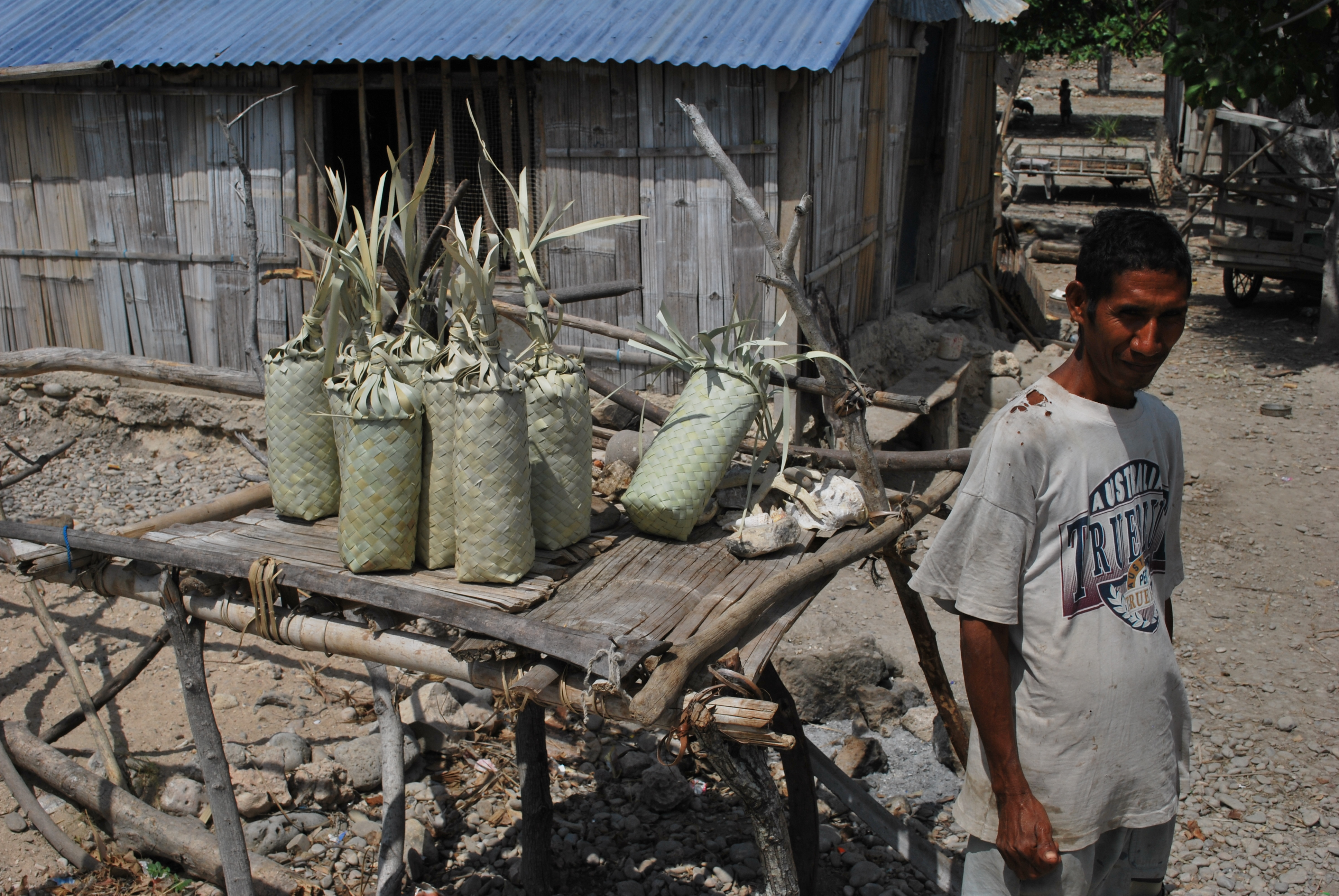 Salzverkauf in Laga